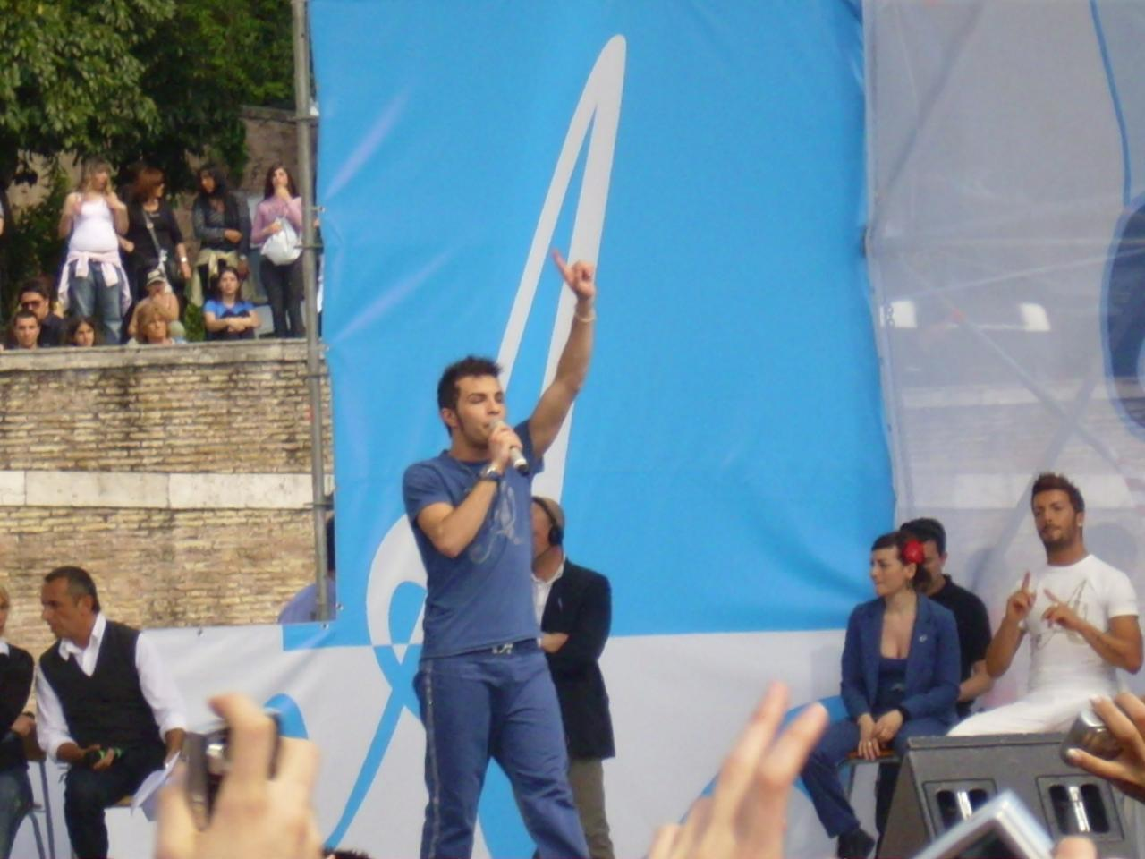 Marco Carta, vincitore del reality show "Amici di Maria De Filippi" in concerto a Cagliari